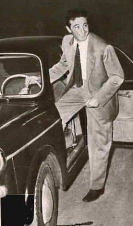 Italian stage director Luca Ronconi